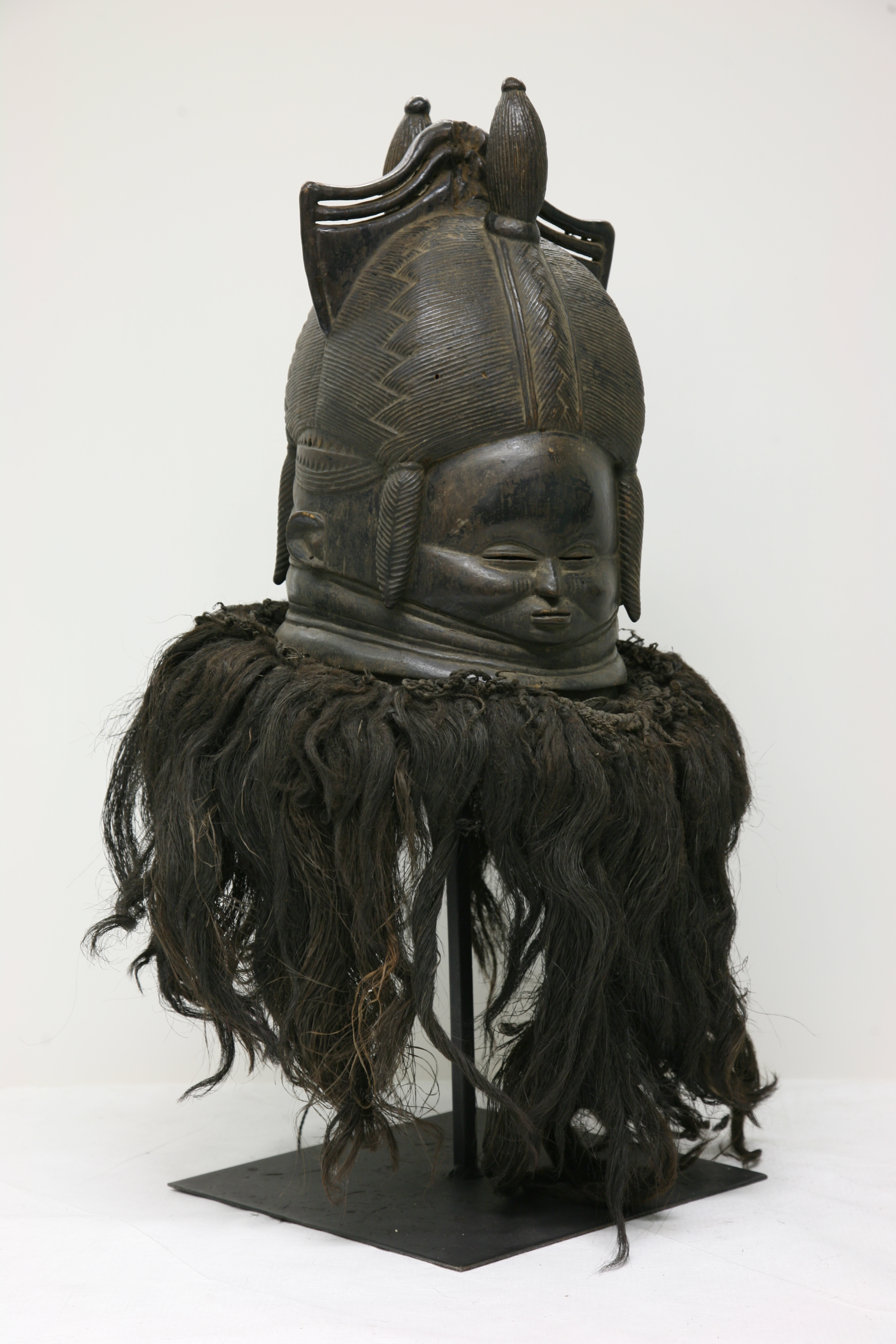 Sande Society helmet mask